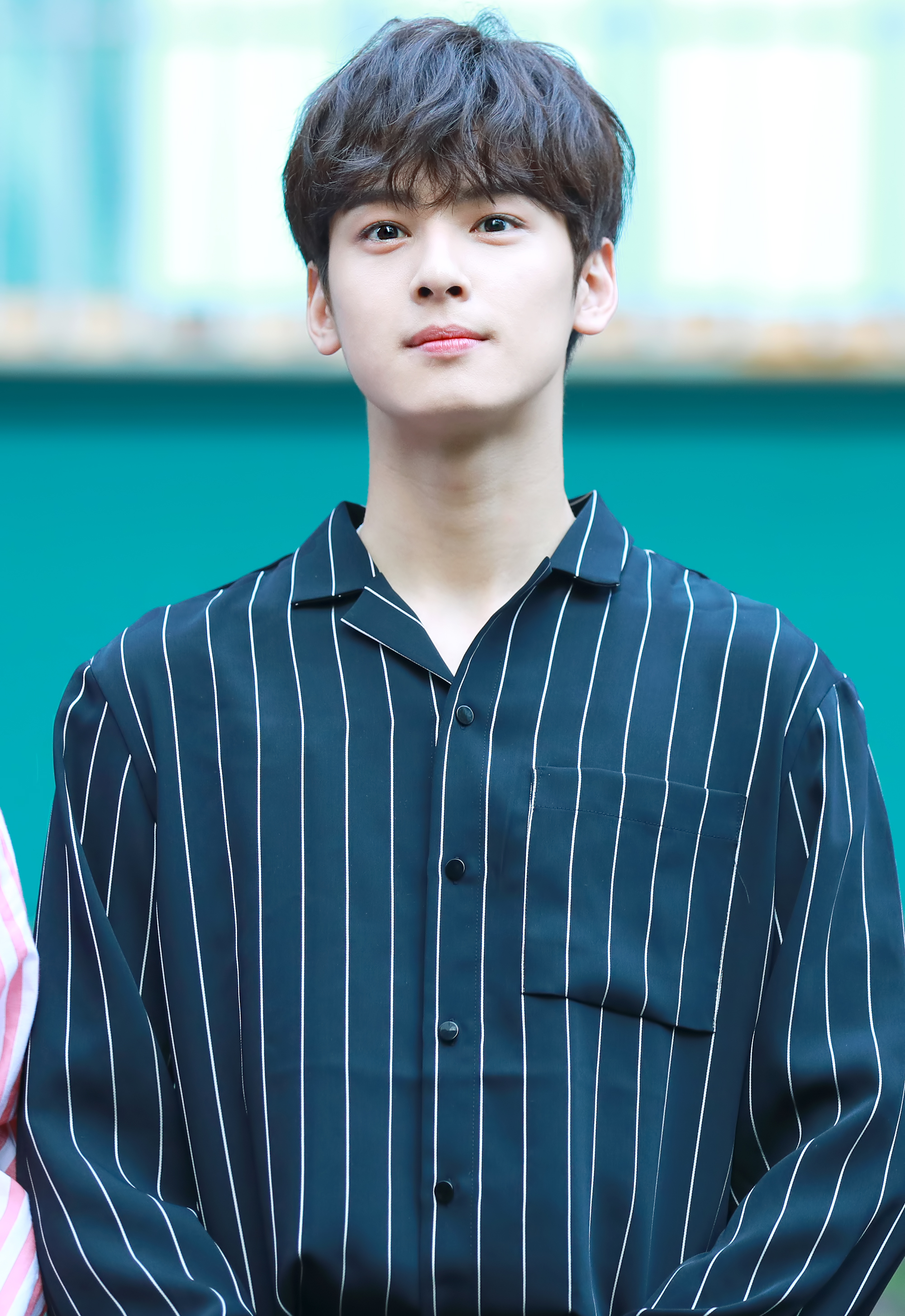 170924 푸드트럭이벤트